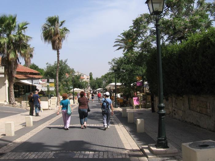 טיילת באמצע העיר